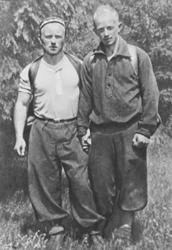 Братья Евгений (слева) и Виталий Абалаковы. Фото 1920-х годов